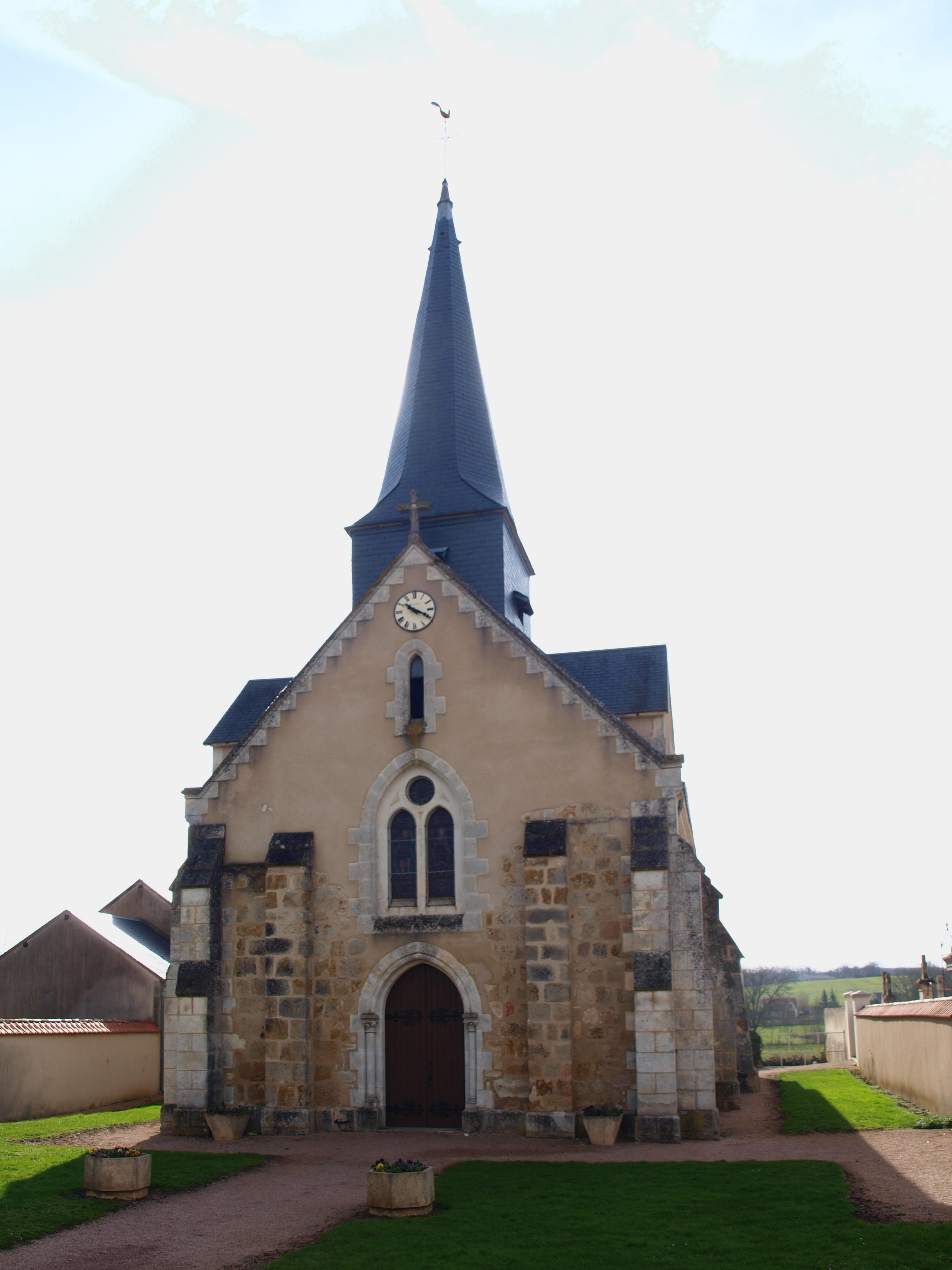 Buxières-d'Aillac (Indre, France) ; église